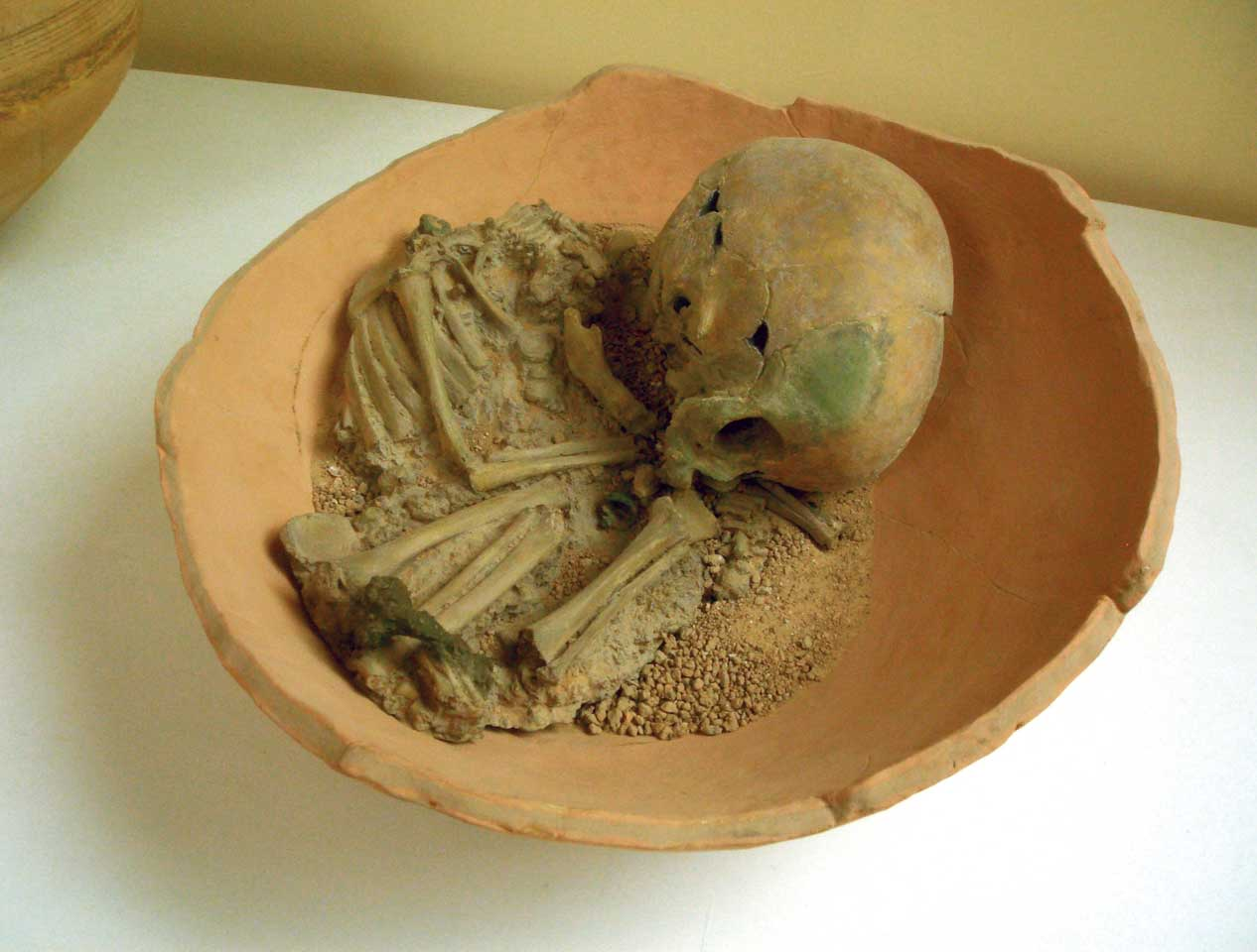 Enterramiento infantil del Castellet de Bernabe